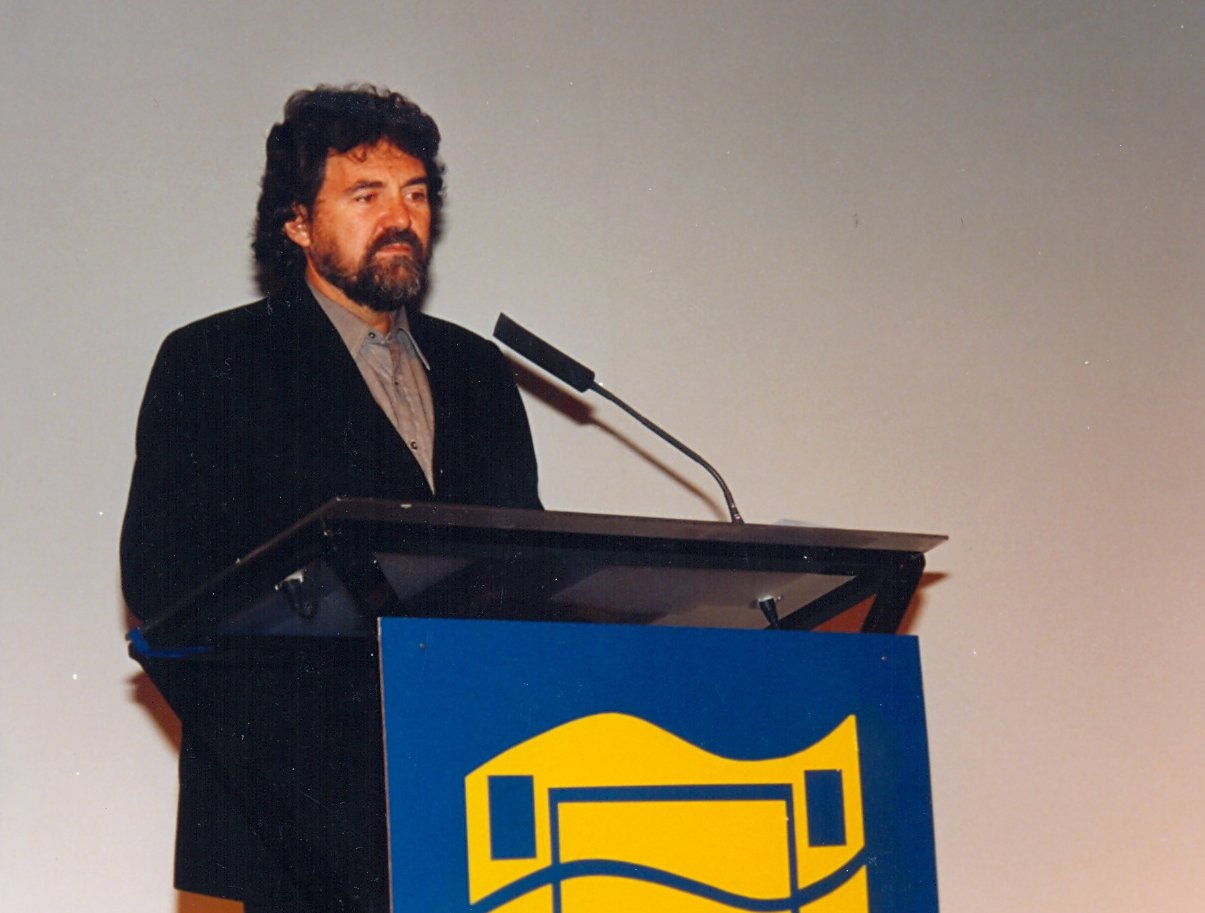 Director Francisco Lombardi (Perú); Presentación Pantaleon y las Visitadoras; año 2000